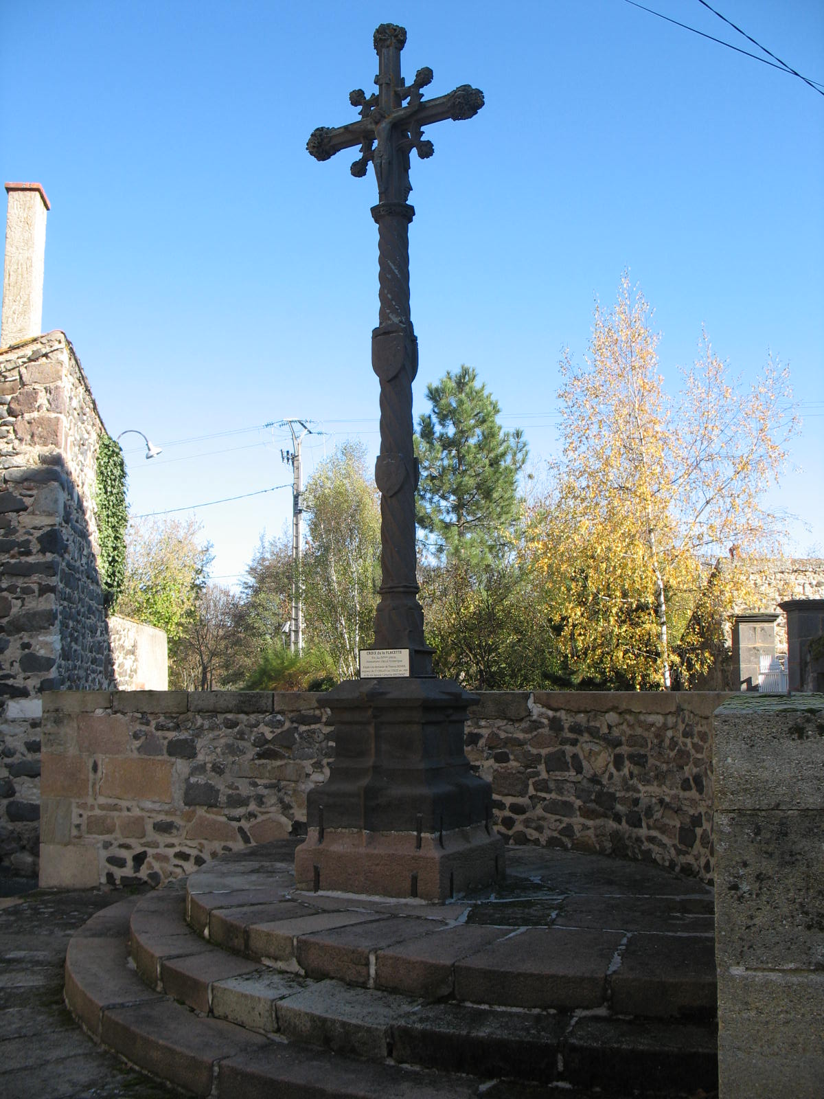 Croix de la placette,fin du XVème.Monument classé historique.